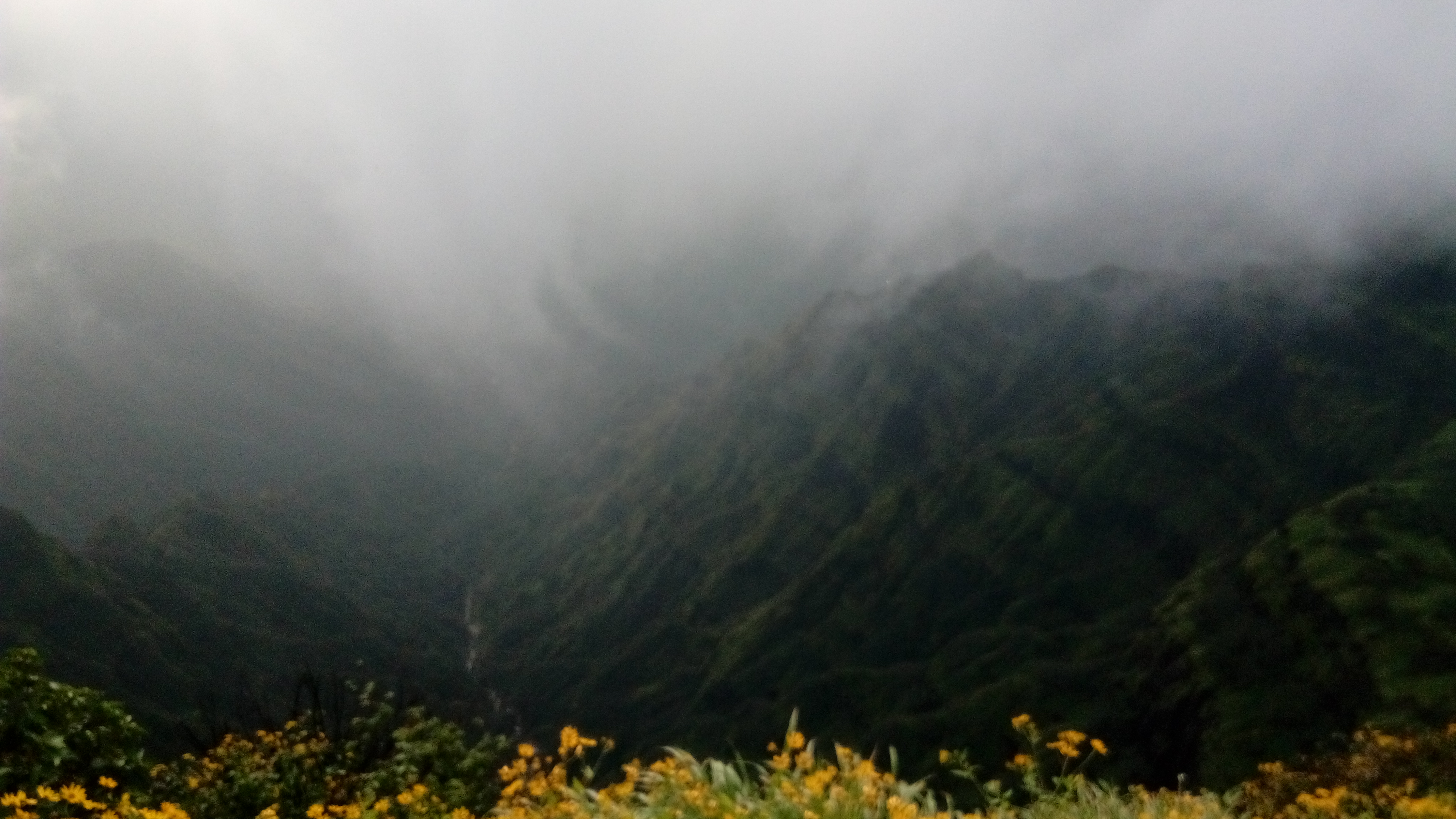 mahableshwar hills